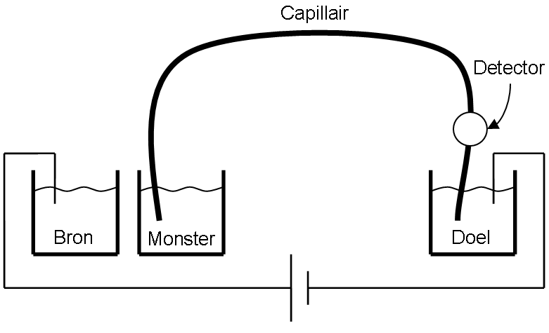 Description Capillaire elektroforese monstername Publiek domein, eigen werk. Capillaire elektroforese monstername